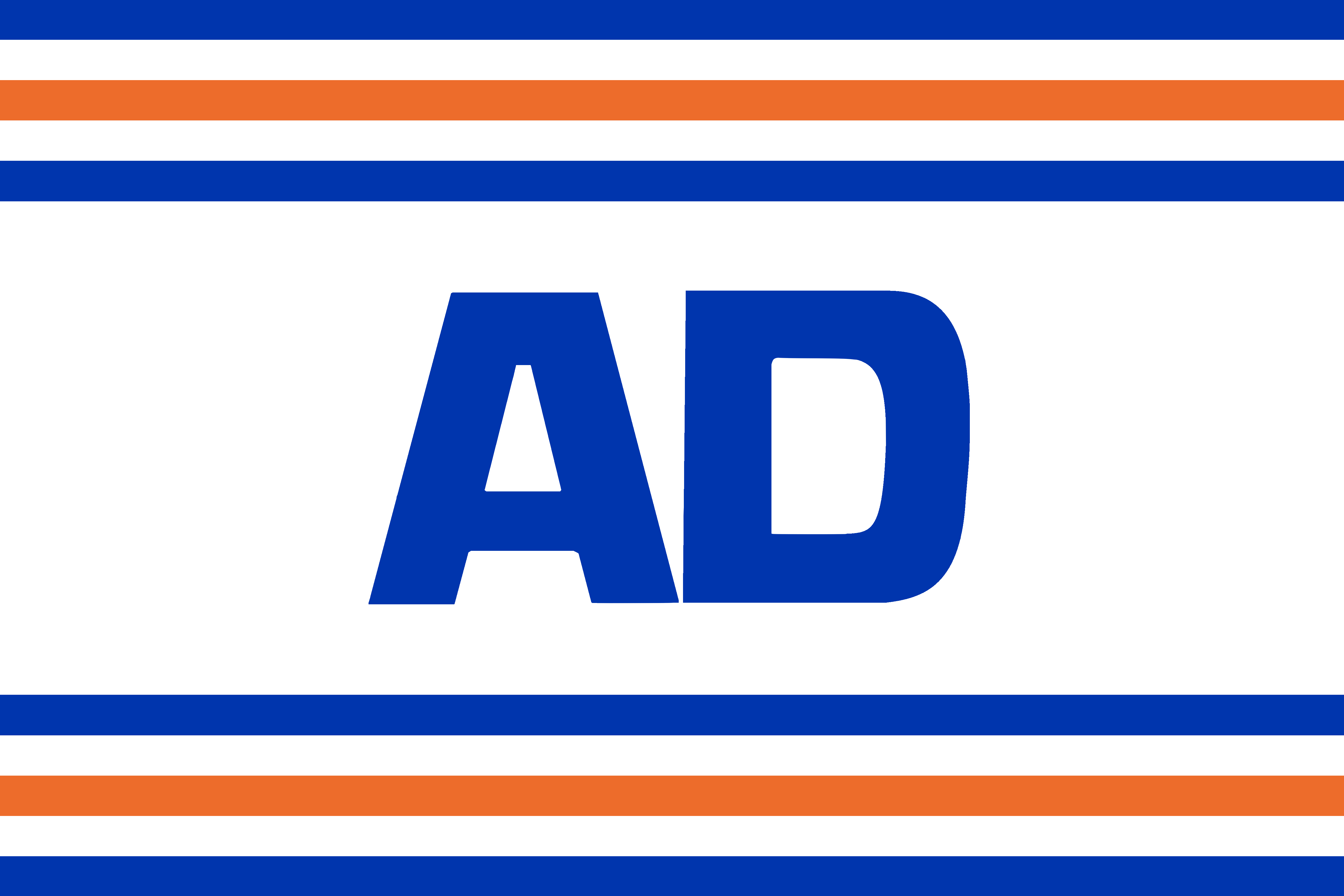 Bandeira do Aliança Democrática.